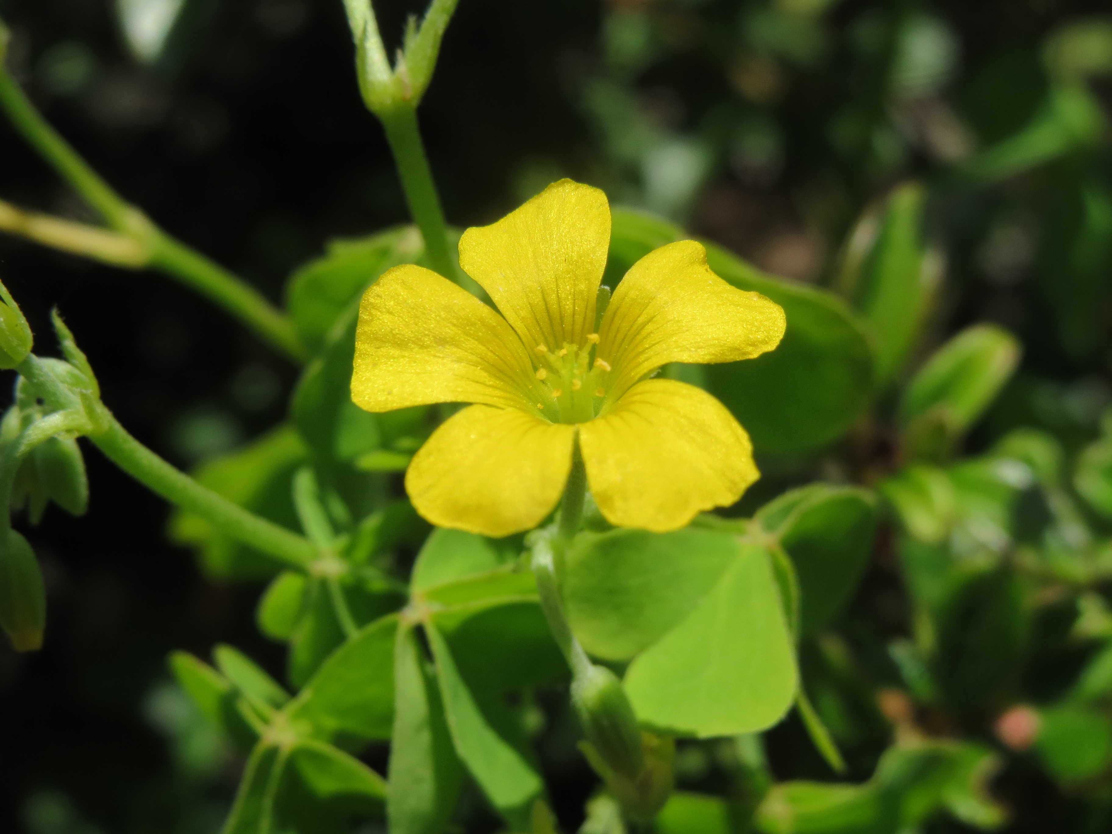 Aufrechter Sauerklee (Oxalis stricta) in Hockenheim